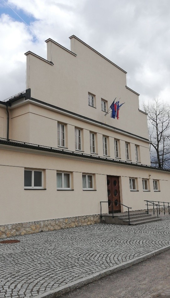 Stavba